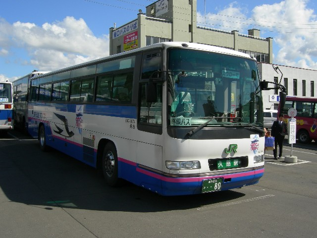 JRバス東北（JR bus Tohoku）スワロー号（専用塗色車）